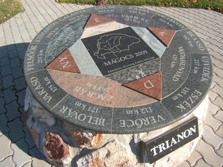 Mágocs, Trianon-emlékmű